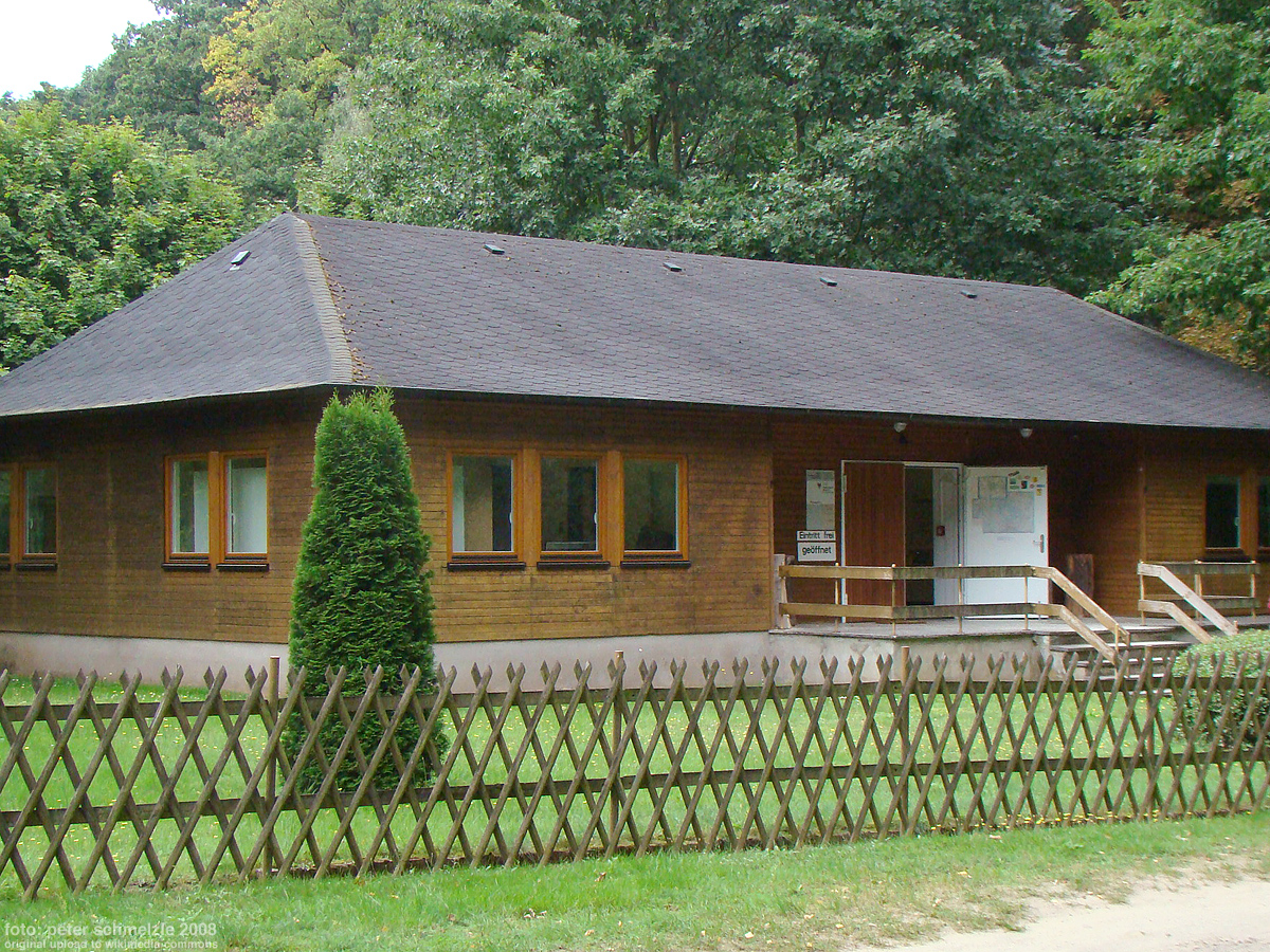 Todesmarsch-Museum in Wittstock/Dosse, Landkreis Ostprignitz-Ruppin